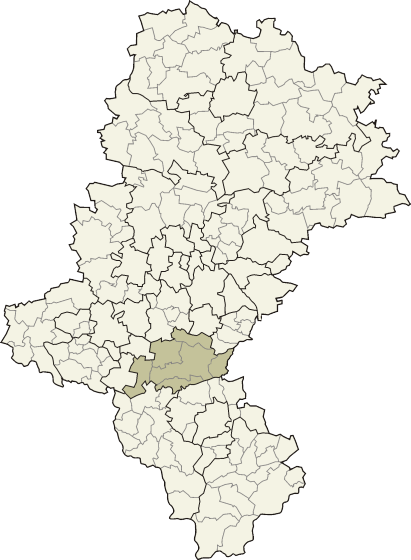 Powiat pszczyński w województwie śląskim